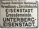 Ortsschild von Unterberg-Eisenstadt